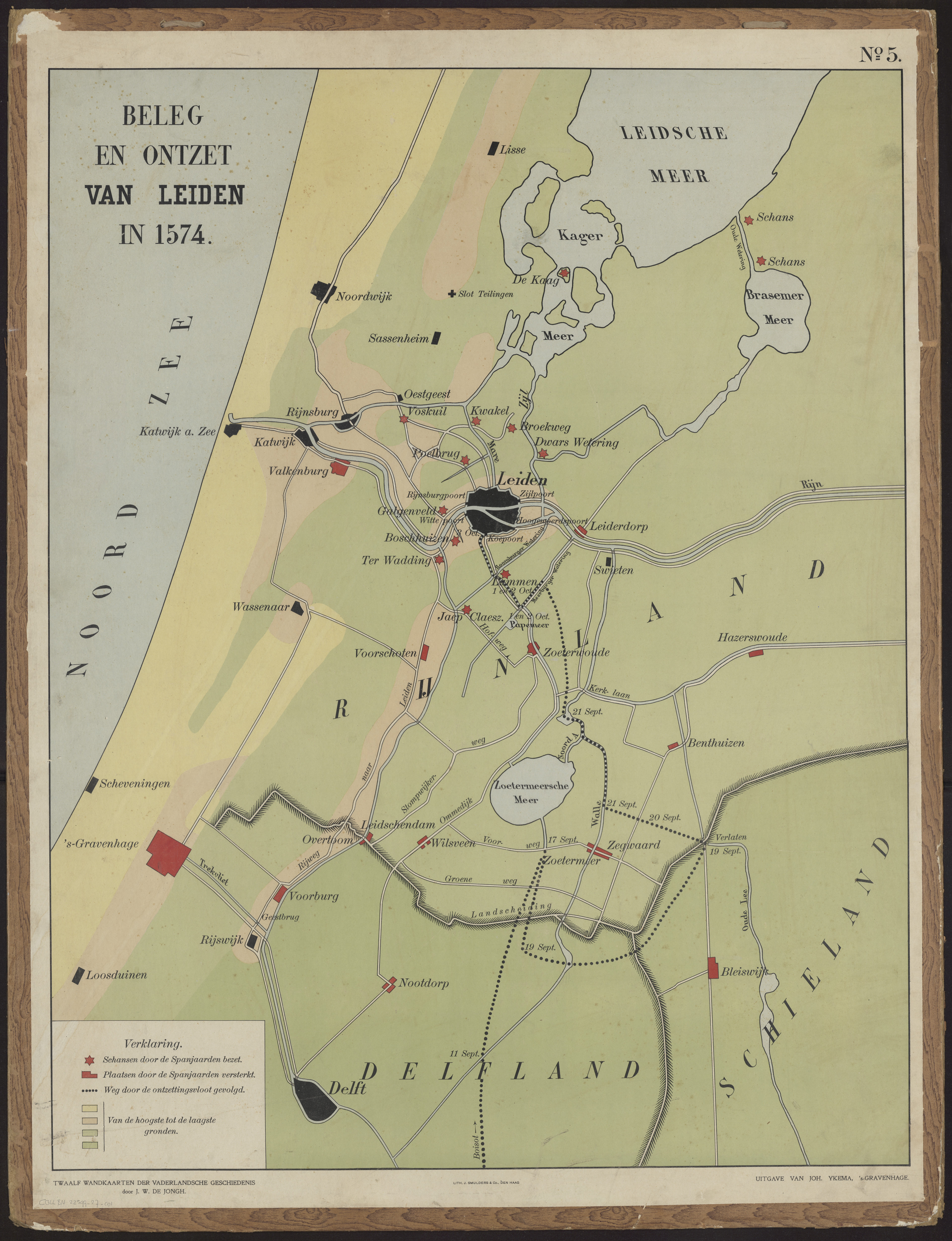 Kaart van Beleg en ontzet van Leiden in 1574. Door J.W. de Jongh. Schaal ca. 1:50,000. Coord.: E 4°14'04"--E 4°42'22"/N 52°18'45"--N 51°58'47" Uitgave: ‘s-Gravenhage, Joh. Ykema, jaar 190X. Kaart no. 5 in de reeks Twaalf wandkaarten der vaderlandsche geschiedenis